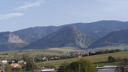 Hoblík